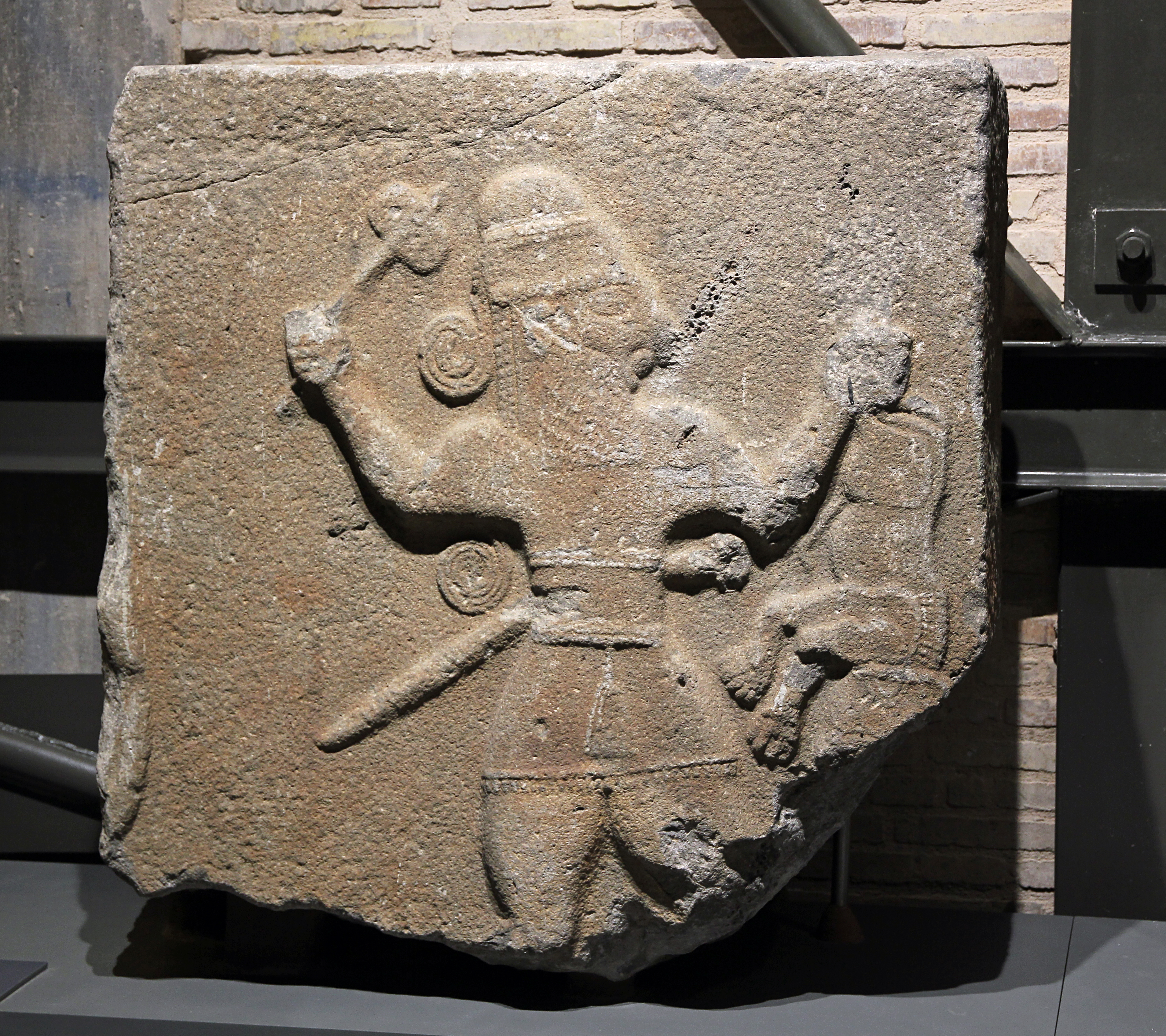 Archäologisches Museum Adana, Südtürkei, späthethitische Stele Pancarlı 1